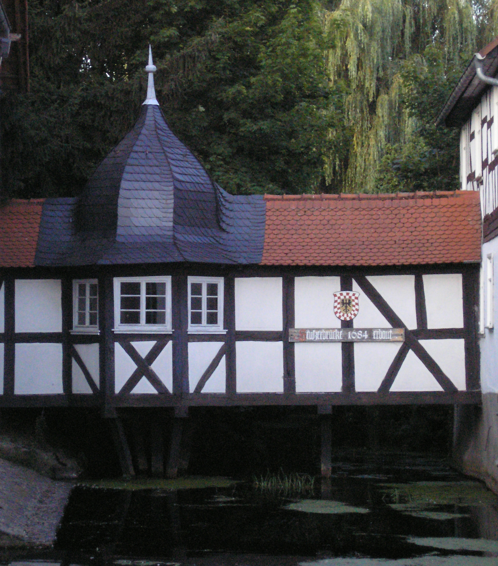 Seufzerbrücke über dem Mühlbach in Florstadt Staden